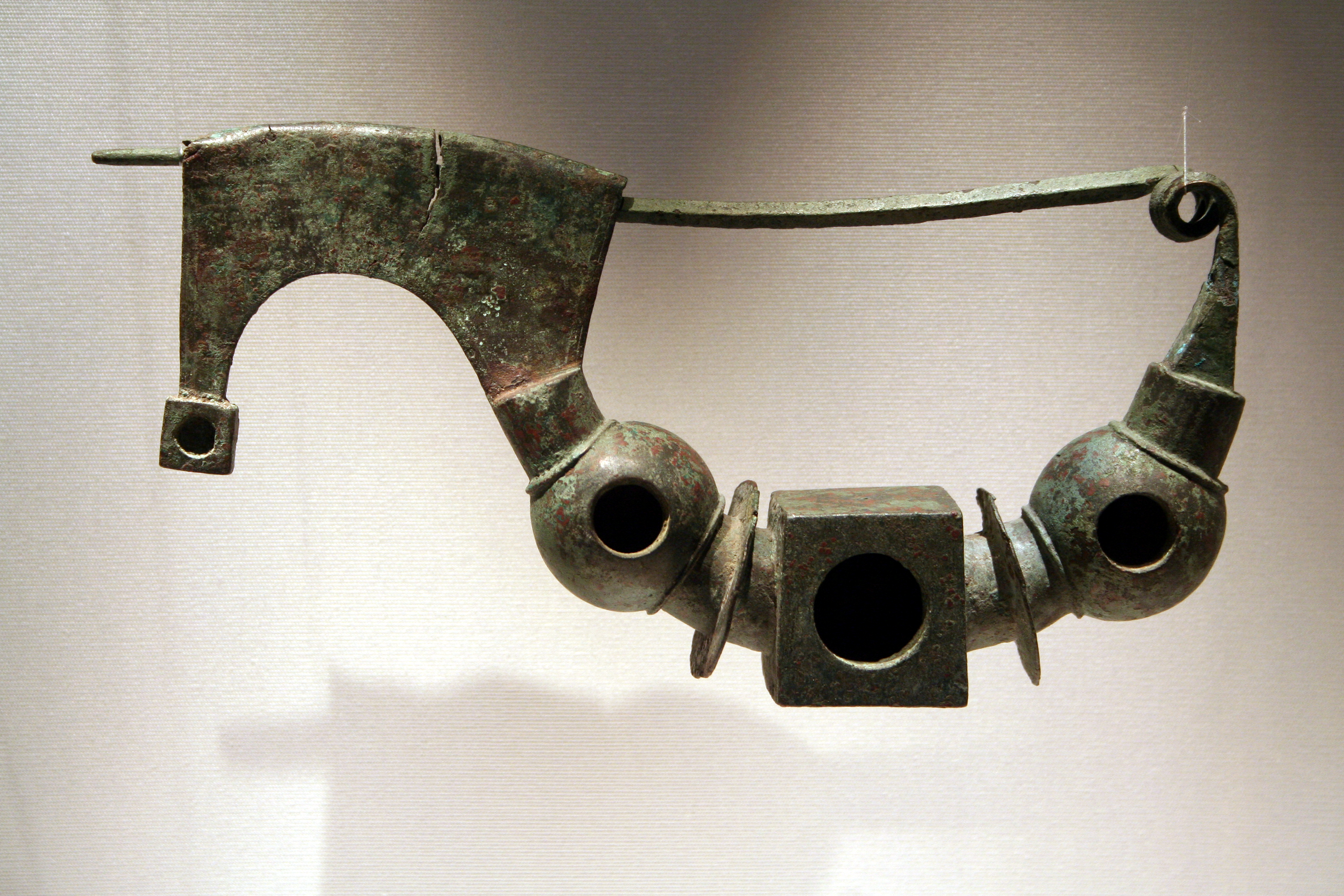 Schmuckmuseum Pforzheim, Fibel, geometrisch, 8. Jhd. v. Chr., Bronze.